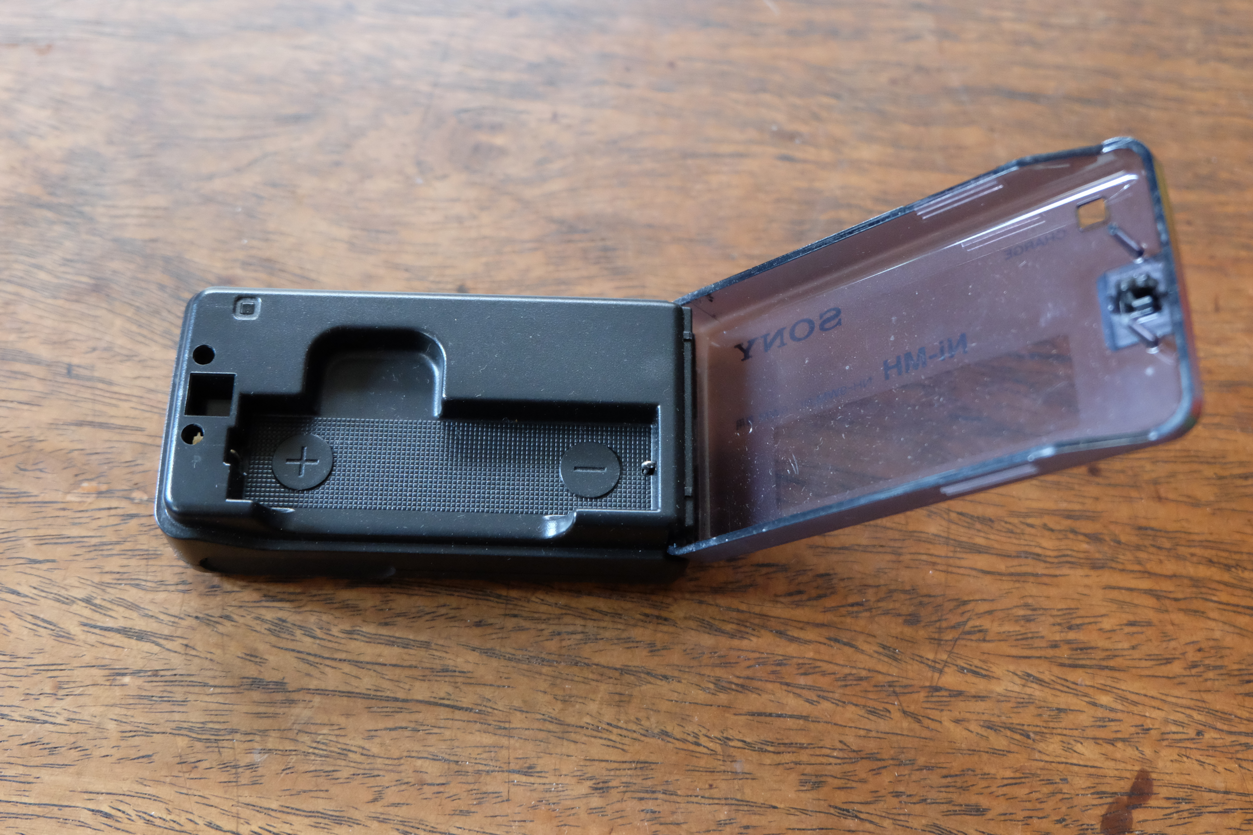 ガム形電池用充電器